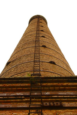 Chimenea construida a principios del siglo XX en la localidad argentina de Villa Ana